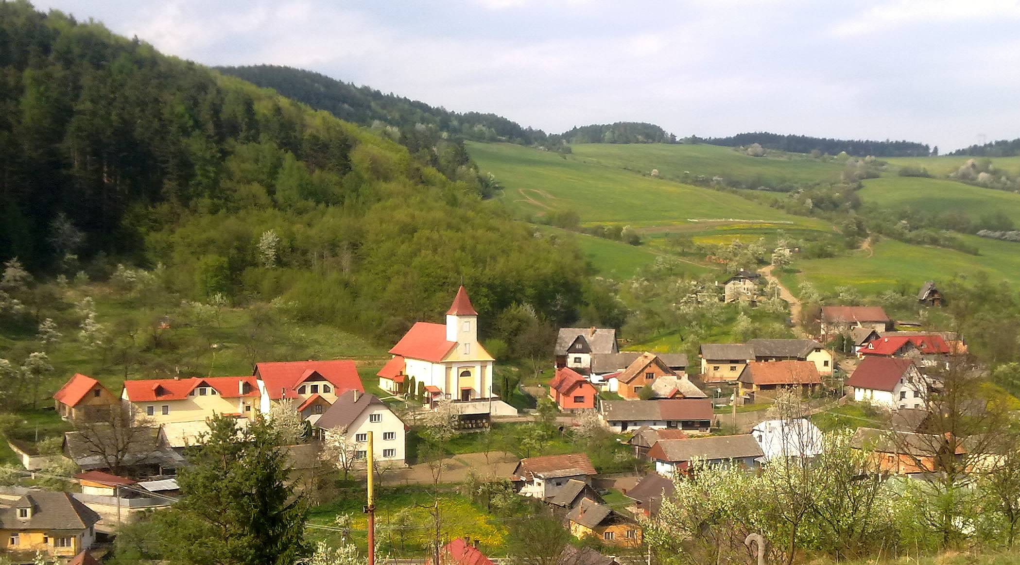 kostol-jar